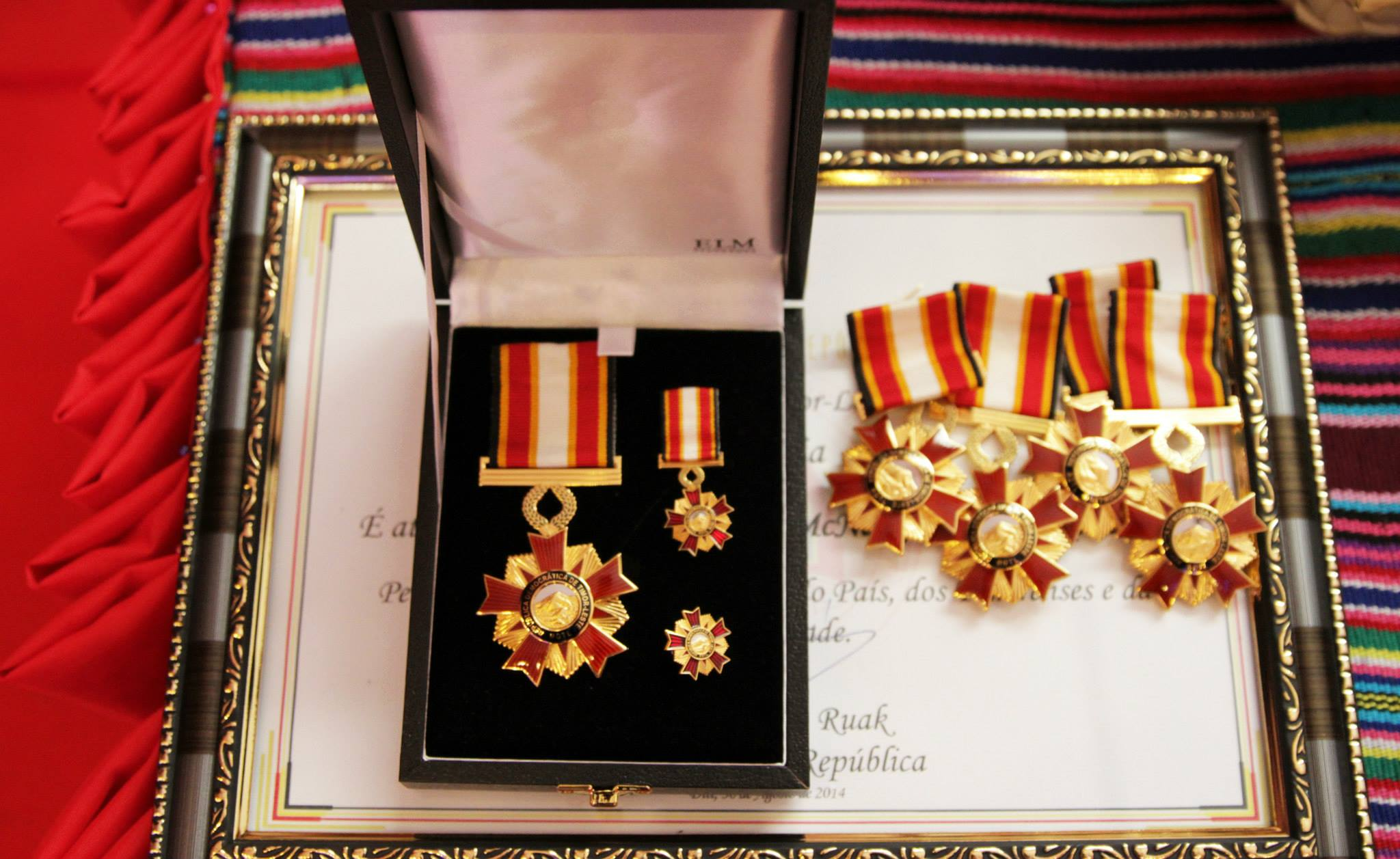 Verleihung des Ordem de Timor-Leste, 30. August 2014.